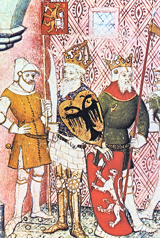 (зліва на право)6 Гектор, Юлій Цезар і Александр Македонський. з паризького рукопису